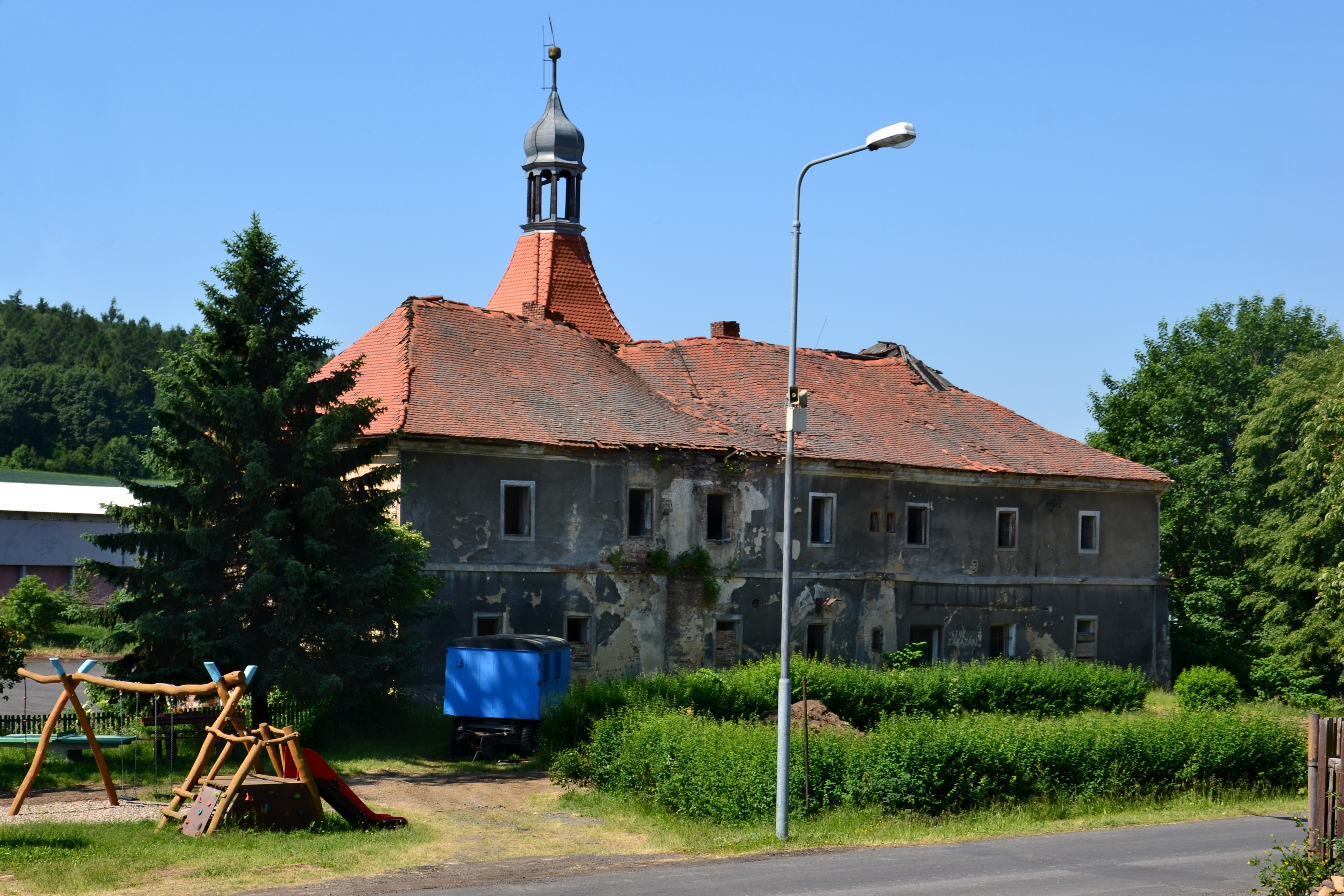 Pohled z návsi